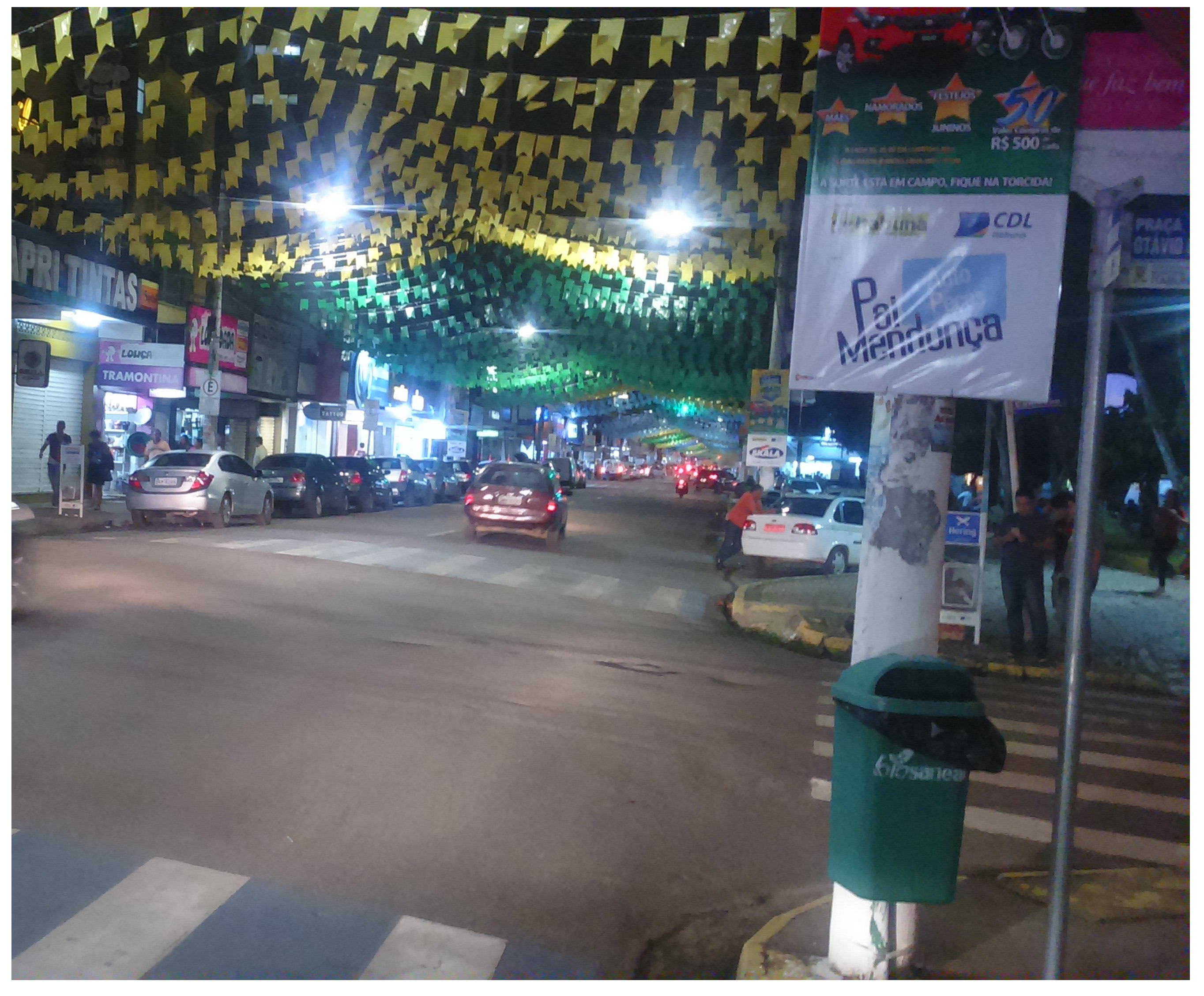 Principal avenida comercial da cidade